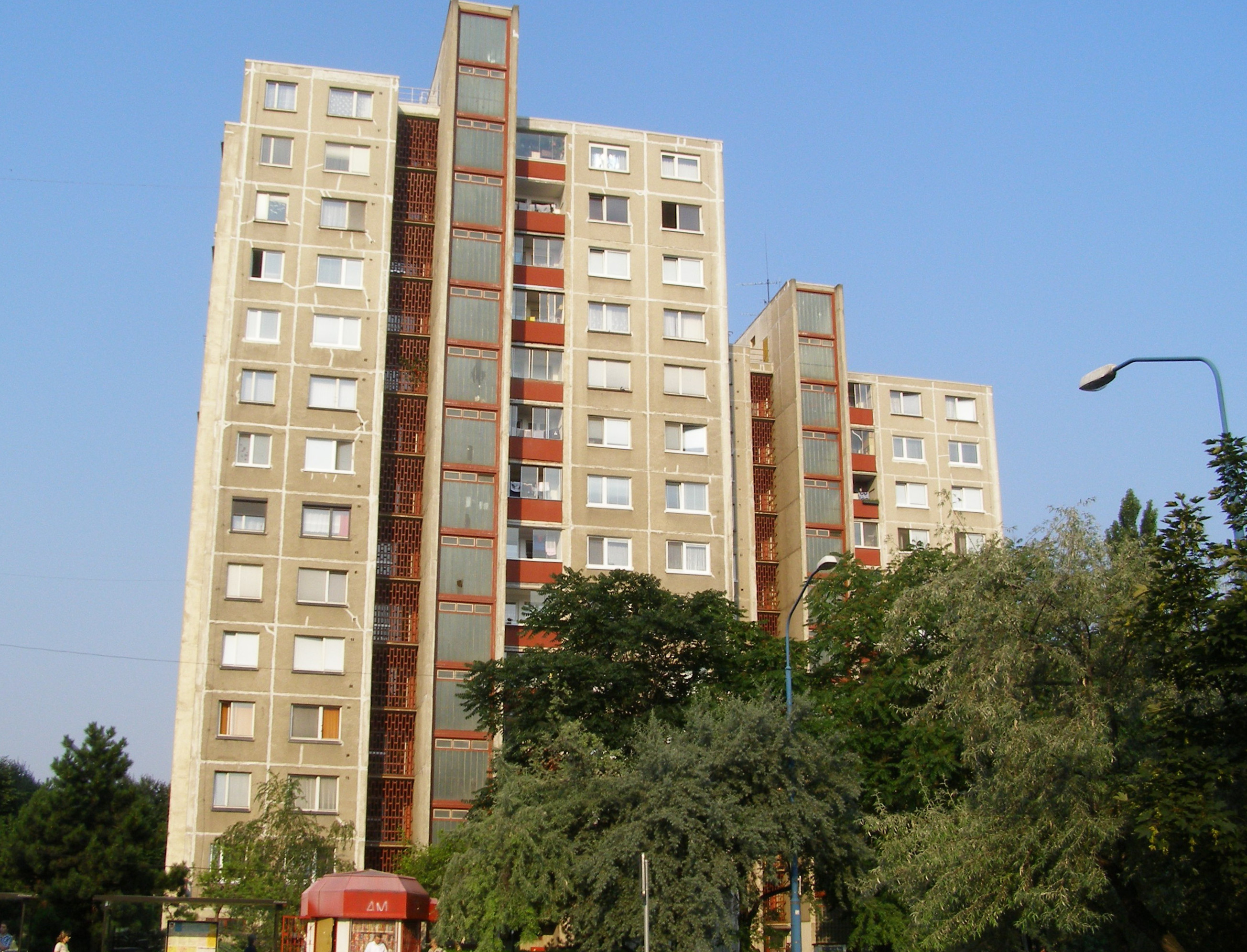 Mamateyova street, Petržalka, Bratislava, Slovakia